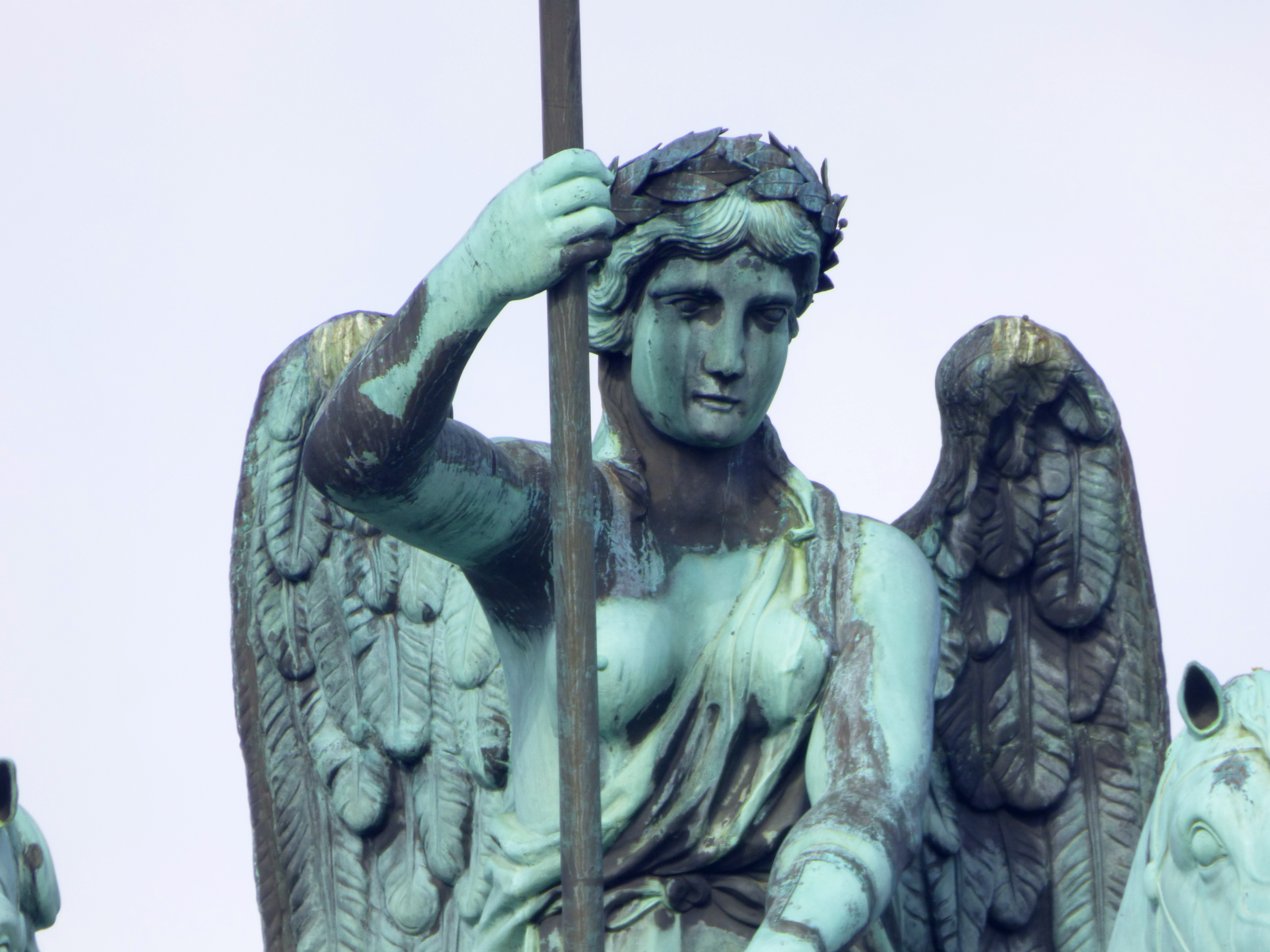 Vistas de la Puerta de Brandenburgo